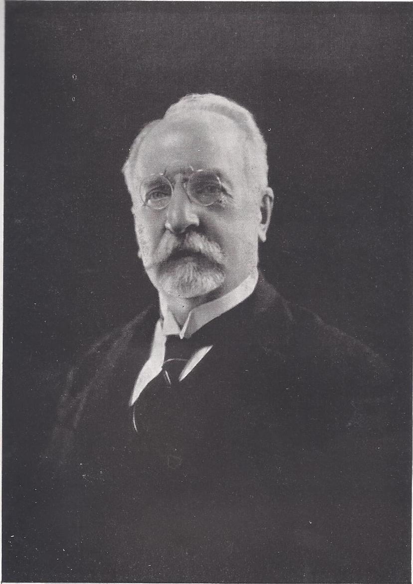 Fotografia de Johannes Franz Hartmann.